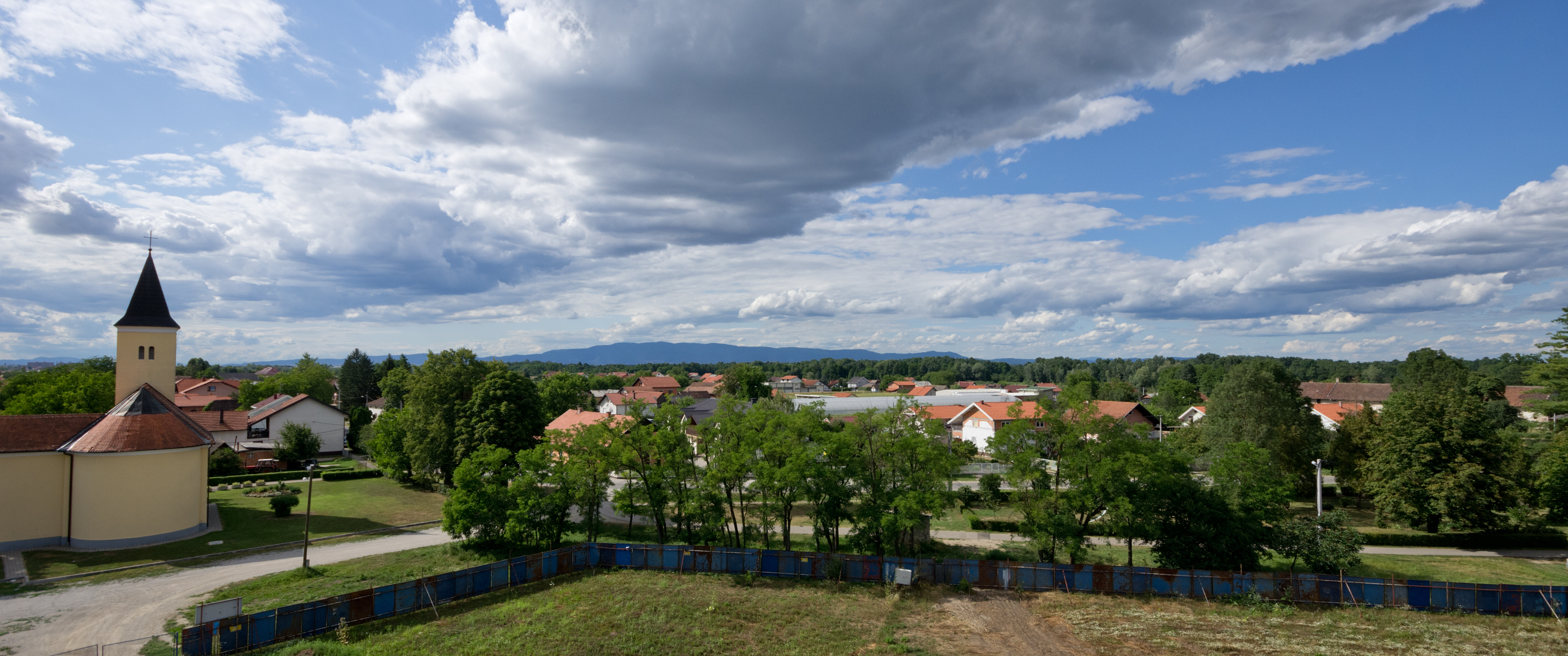 Pogled na Novo Čiče s dizalice na gradilištu osnovne škole